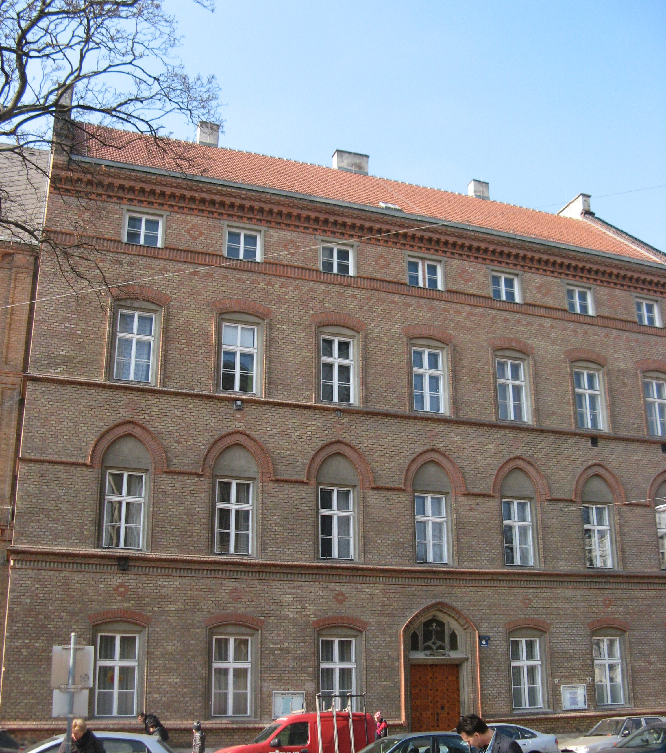 Pfarrhof, Keplerplatz 6, Wien-Favoriten